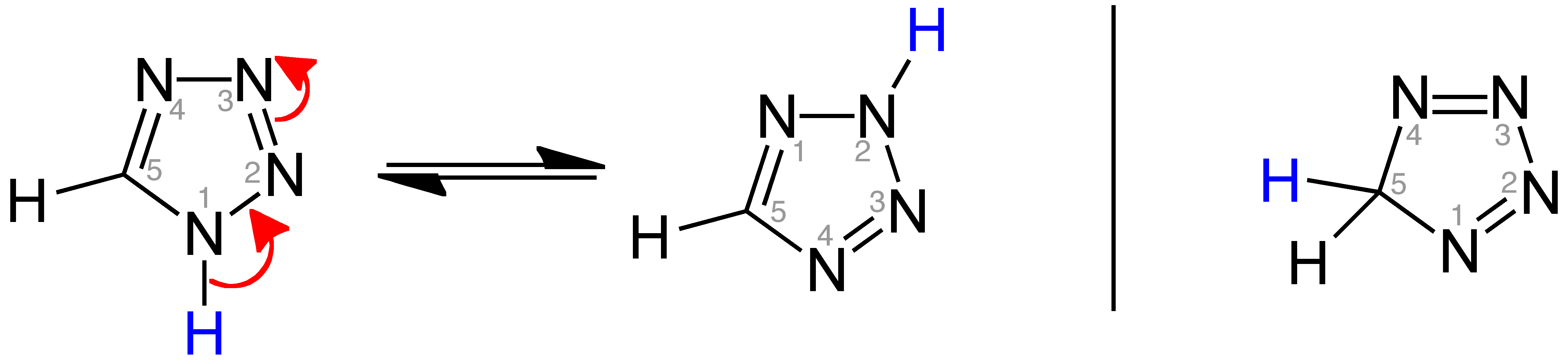 Tautomerie der 1H-Tetrazole und 2-H-Tetrazole Vergleich mit 5-H-Tetrazol